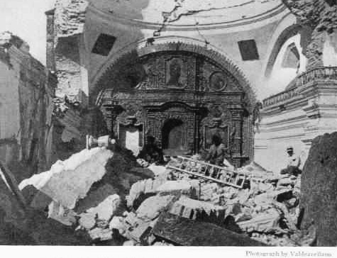 Altar del Cerrito del Carmen tras los terremotos de 1917-18 en la ciudad de Guatemala.